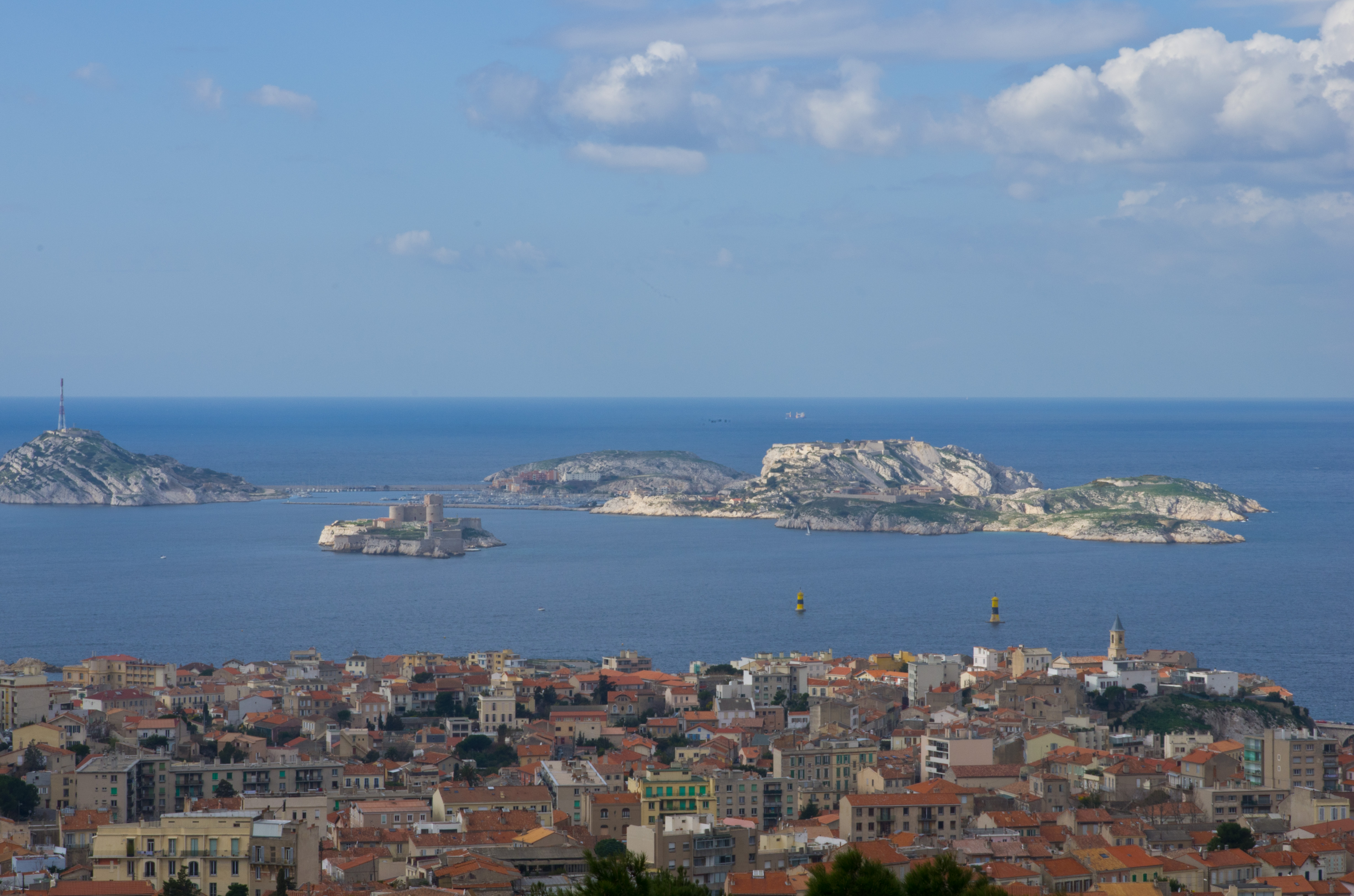 Iles du Frioul